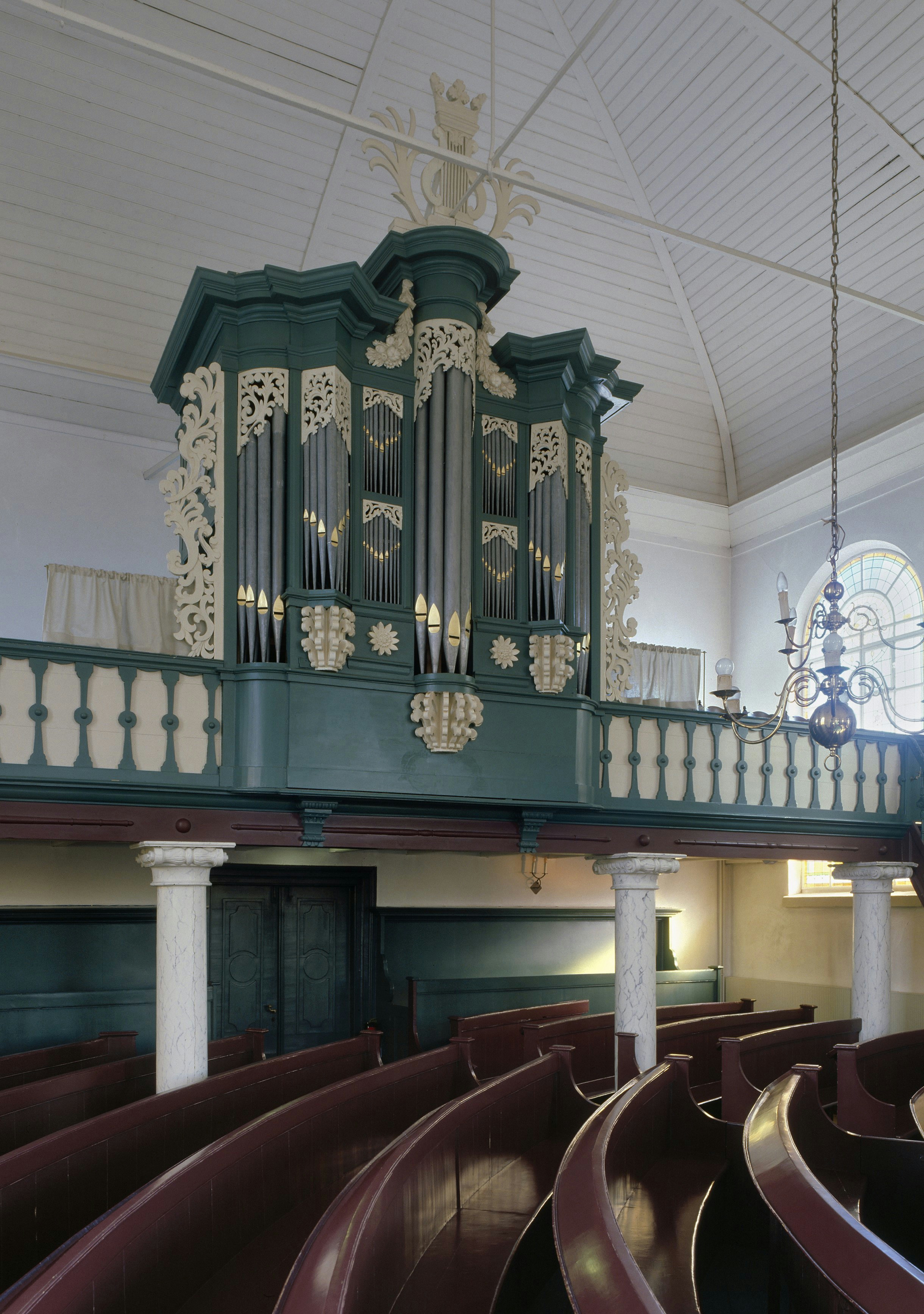 Nederlandse Hervormde Kerk: Interieur, overzicht orgel